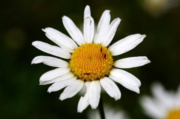 Margherita tetraploide - Giardino Botanico Alpino "Giangio Lorenzoni", Pian Cansiglio, Tambre d'Alpago (BL), 1000 m s.l.m.